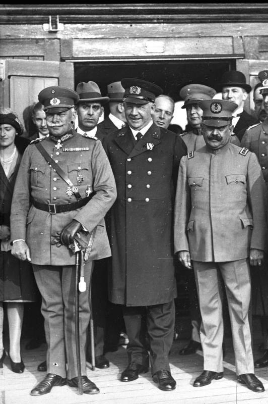 Chilenischer Besuch in Deutschland! General Diaz, der General-Inspekteur der chilenischen Armee traf auf dem Dampfer "Stuttgart" des Norddeutschen Lloyd in Bremen ein. Zu seiner Begrüssung hatte sich der Chef der deutschen Heeresleitung General Heye eingefunden. Der chilenische General Diaz (rechts) und der Chef der deutschen Heersleitung General Heye nach der Begrüssung an Bord des Lloyddampfers "Stuttgart" in Bremen.